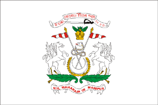 Bandera nacional de Manipur, blanca Imagen realizada por J. Ollé Véase también: Wikipedia:Autorizaciones/Banderas de Jaume Ollé Categoría:Banderas (imagen)